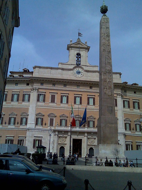 Palazzo di Monte Citorio, già sede della Curia innocenziana e del dazio pontificio, oggi sede della Camera dei Deputati